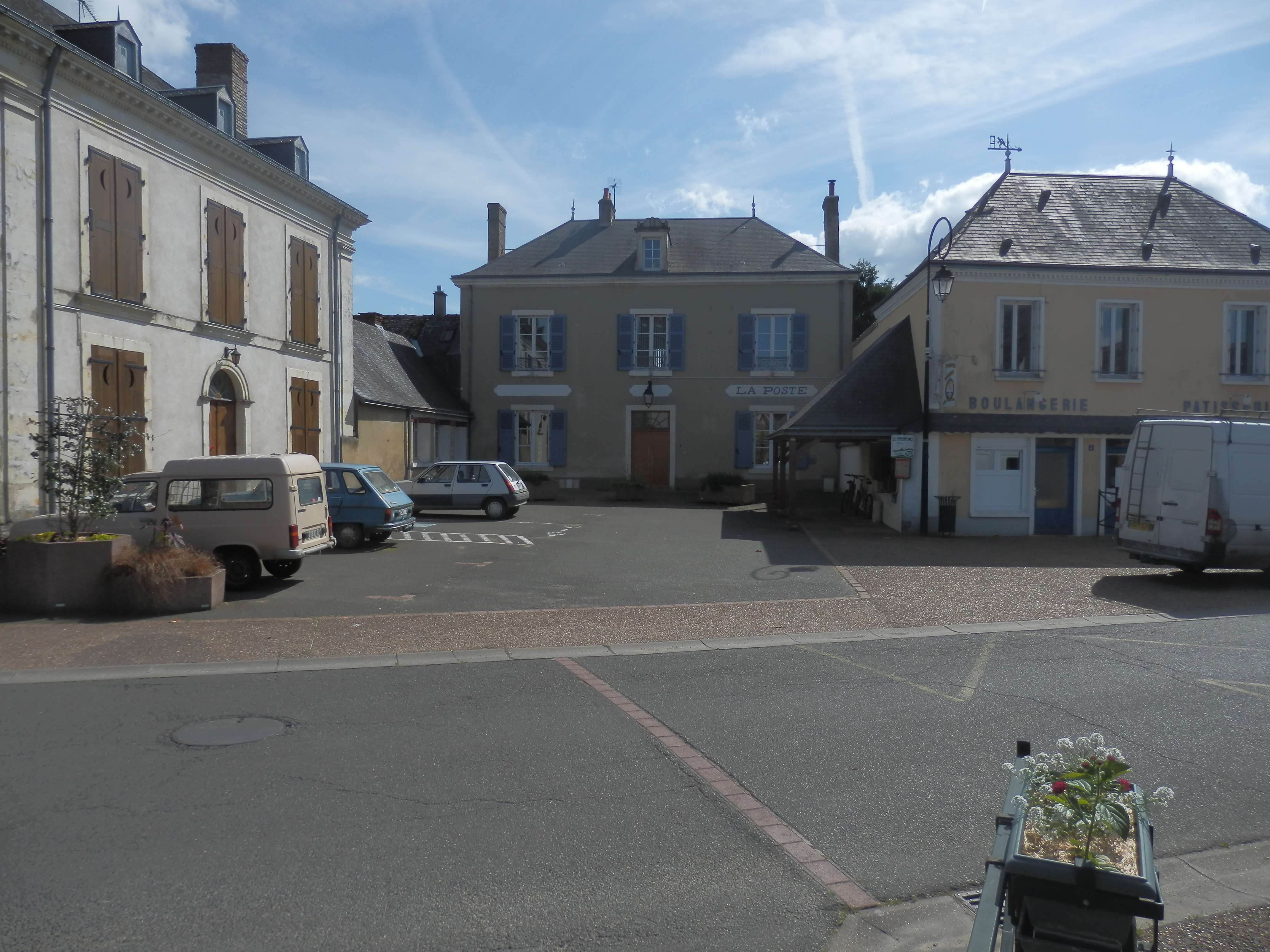 Petite placette à Volnay.